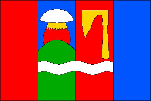 Vlajka obce Vršovice